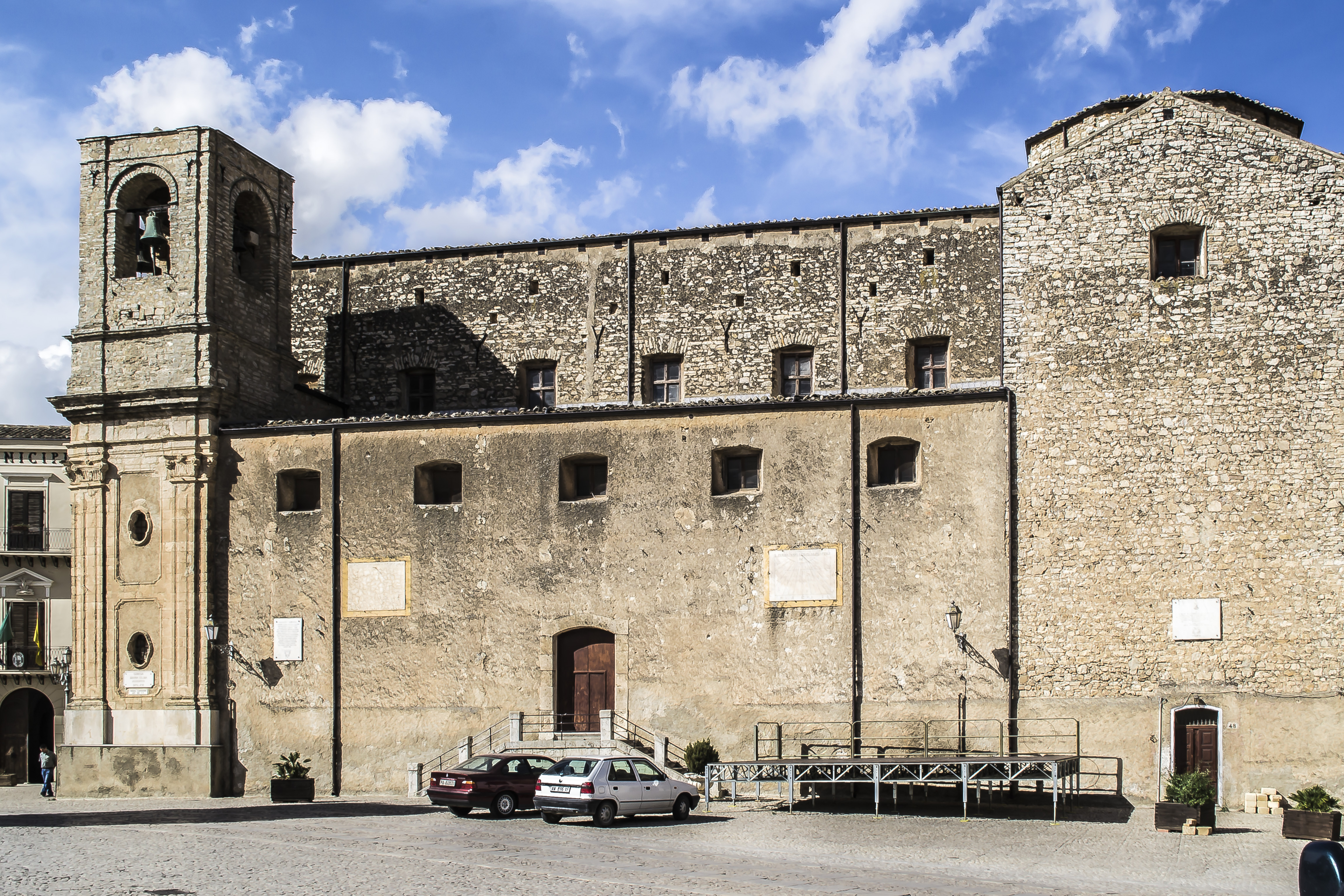 Chiesa Maria Santissima Assunta di rito gotico-bizantino This is a photo of a monument which is part of cultural heritage of Italy.